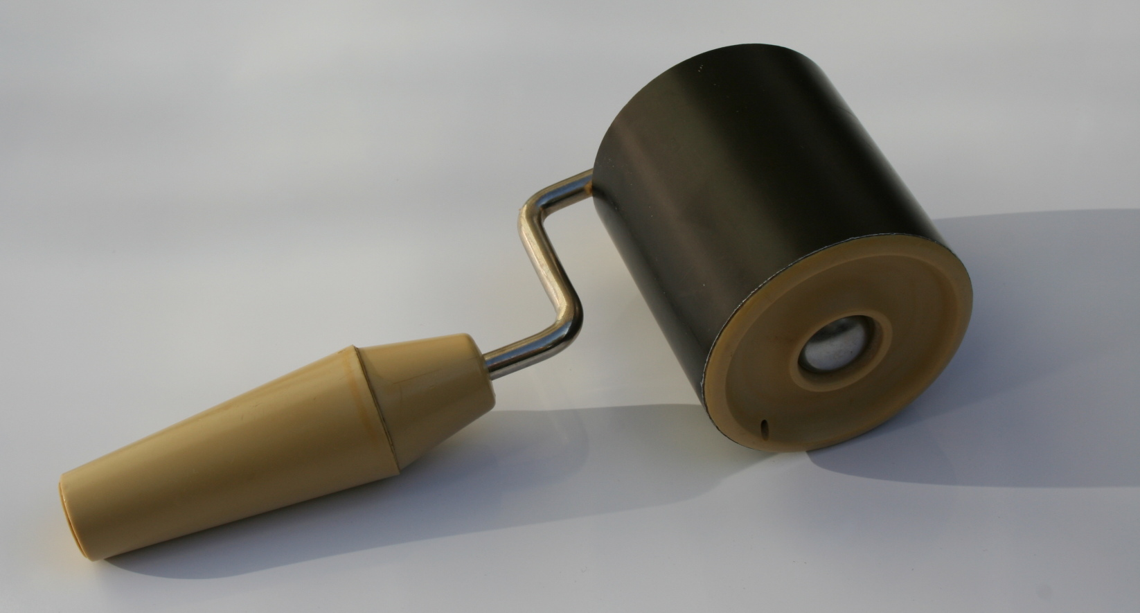 Teigrolle